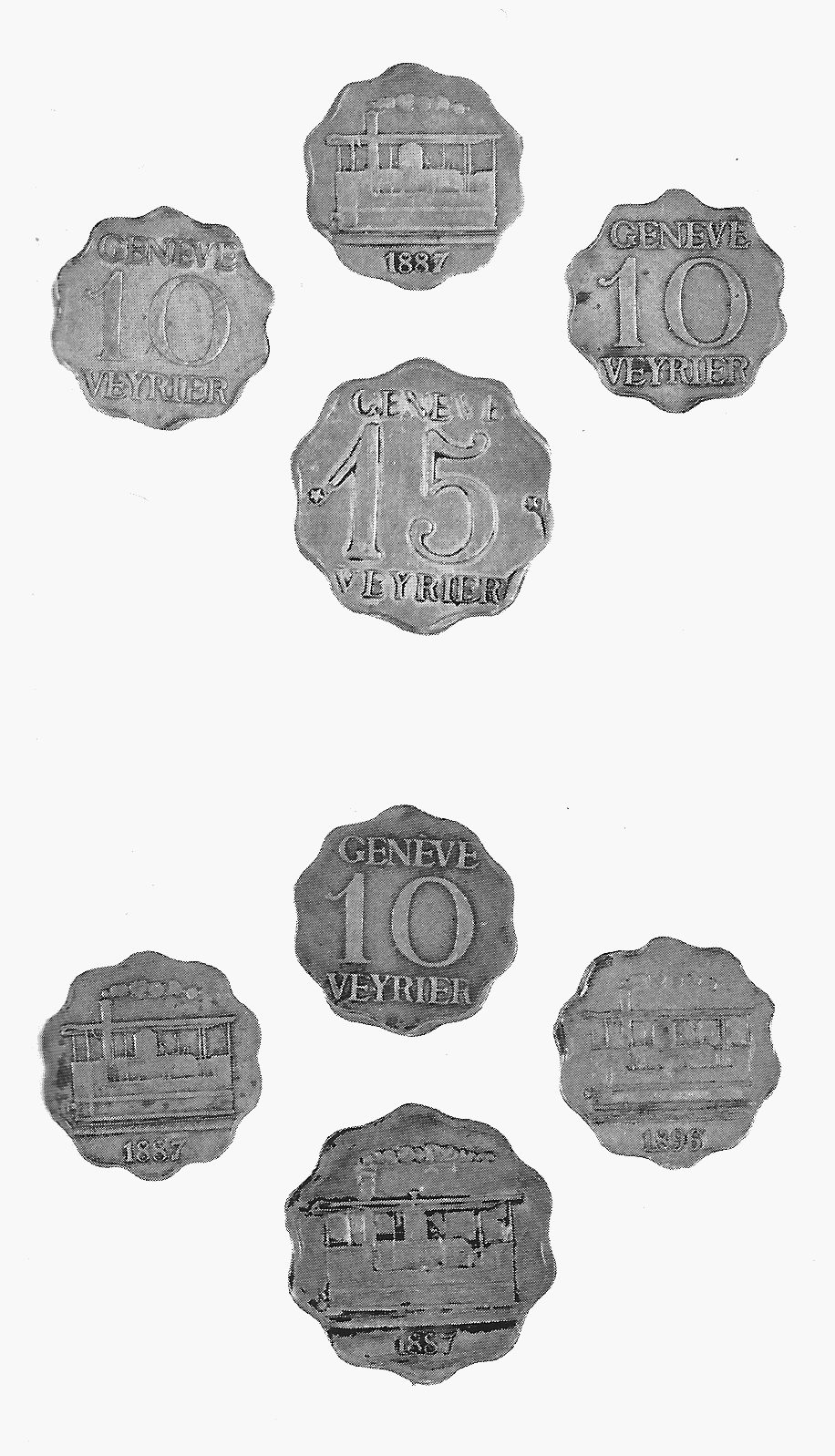 Jetons du GV